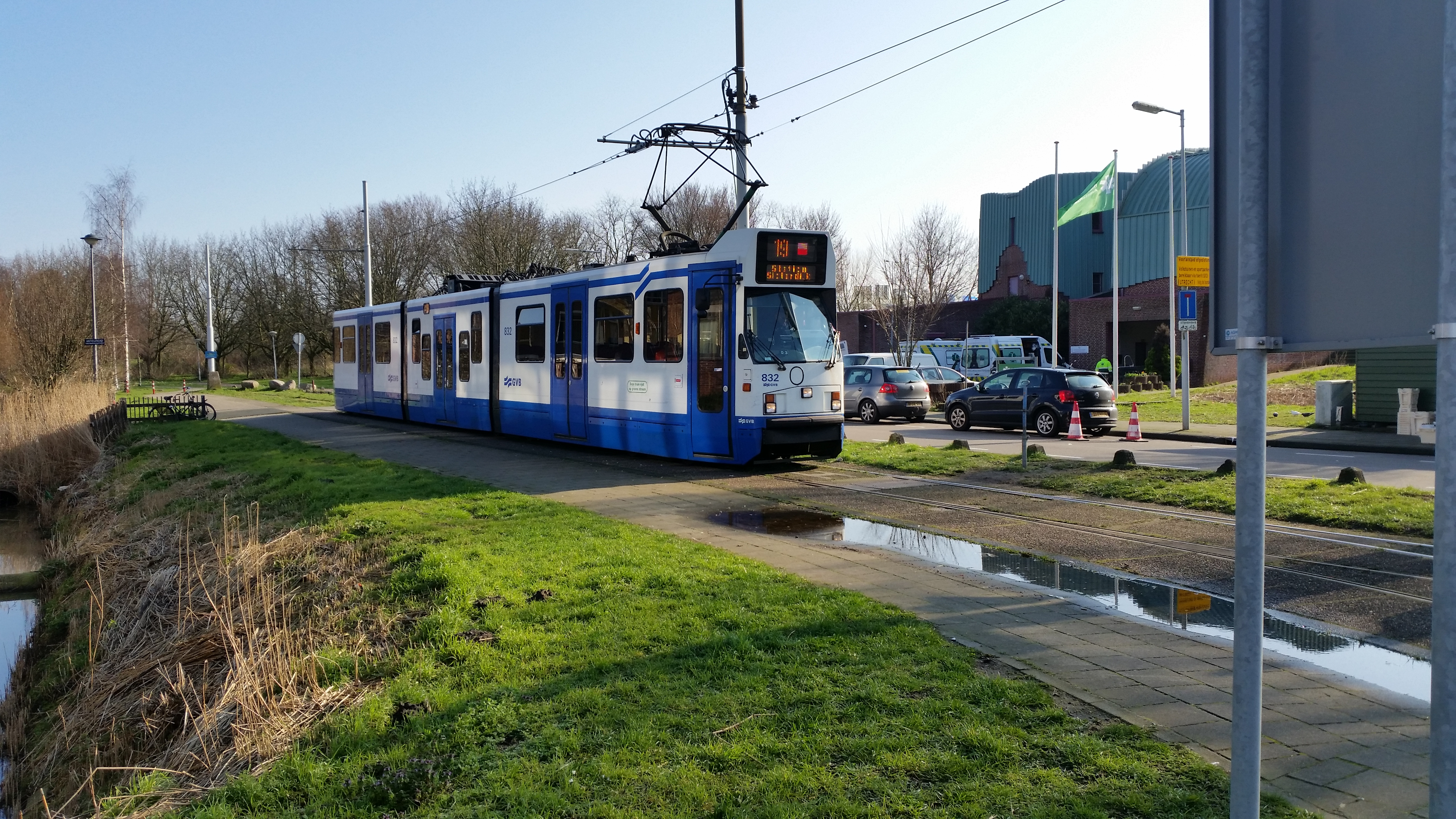 Tijdelijke eindhalte van lijn 19 aan het Voorlandpad ivm werkzaamheden in februari en maart 2020 aan de Hartveldseweg, Diemen